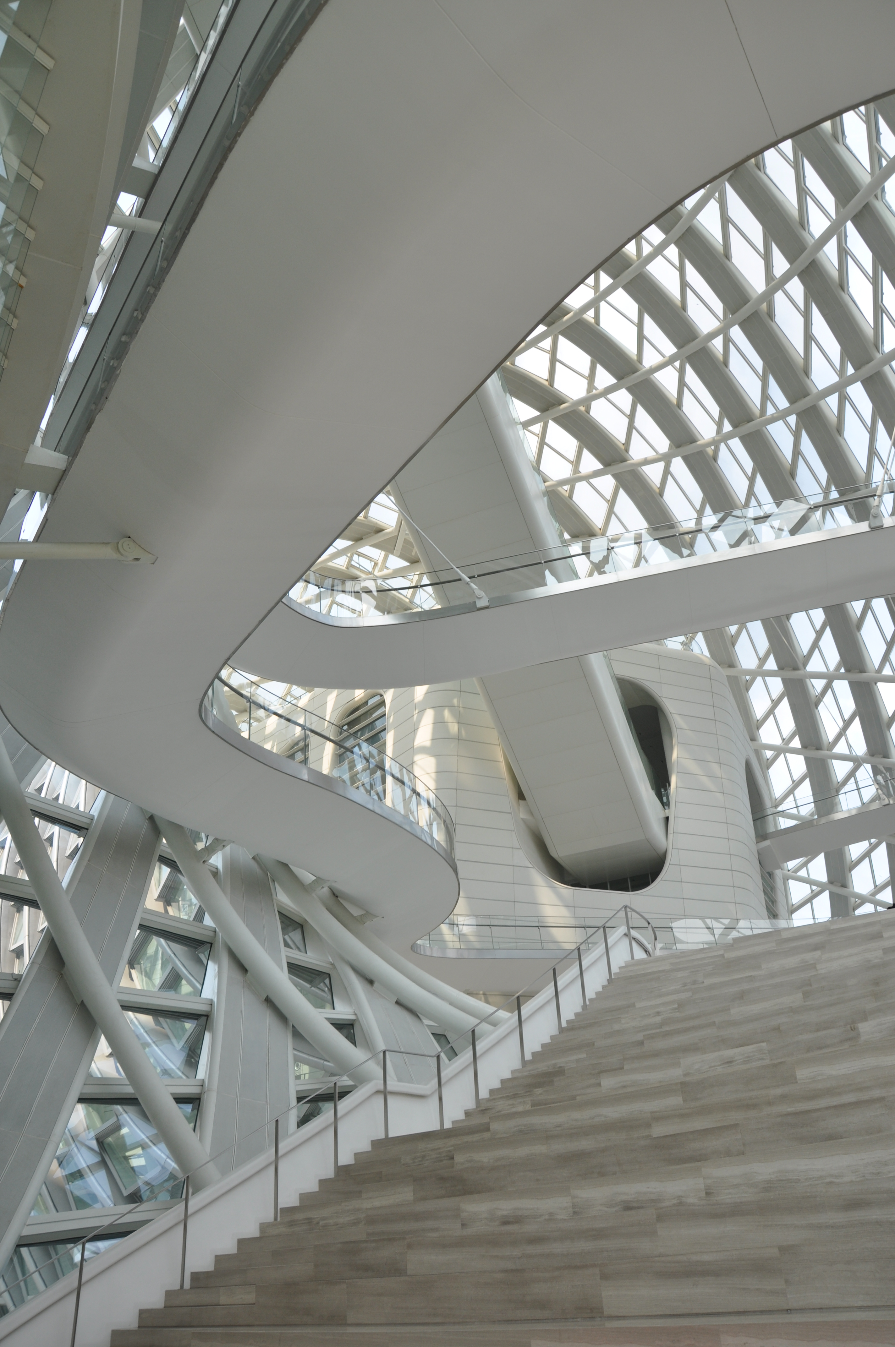 的东中庭仰望，可以看到人行台阶、上访的人行坡道以及电扶梯底部。